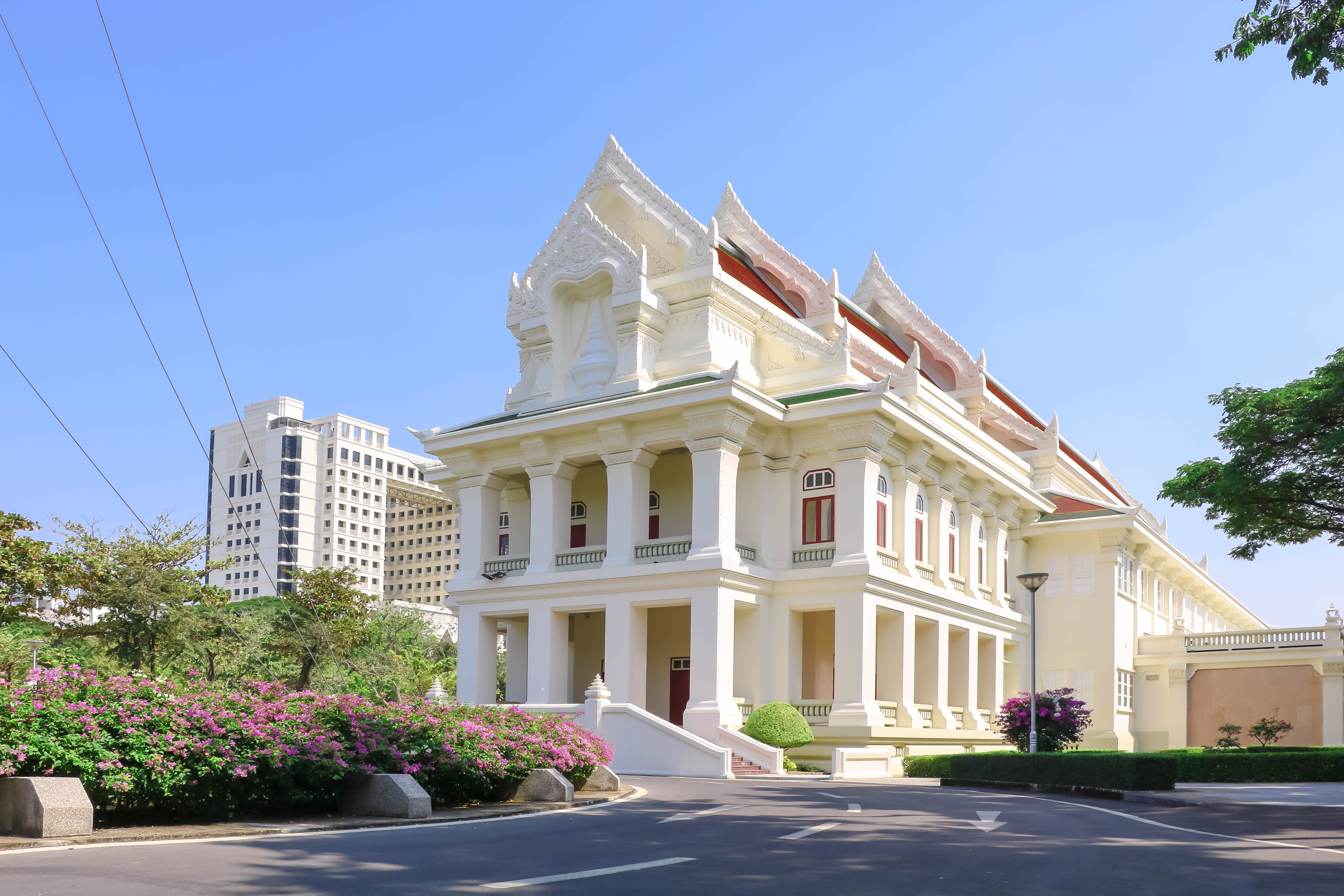 หอประชุมจุฬาลงกรณ์มหาวิทยาลัย เรียกอย่างไม่เป็นทางการว่า"หอประชุมจุฬาฯ"เป็นหอประชุมใหญ่ของจุฬาลงกรณ์มหาวิทยาลัย อาคารสำคัญแห่งนี้มีความเป็นมาคู่กับจุฬาลงกรณ์มหาวิทยาลัยมาอย่างยาวนาน อีกทั้งยังมีเหตุการณ์สำคัญในประวัติศาสตร์เกิดขึ้นที่อาคารแห่งนี้หลายเหตุการณ์ หอประชุมจุฬาลงกรณ์มหาวิทยาลัย ตั้งอยู่ภายในจุฬาลงกรณ์มหาวิทยาลัย แขวงปทุมวัน เขตปทุมวัน กรุงเทพมหานคร หอประชุมจุฬาลงกรณ์มหาวิทยาลัย หอประชุมจุฬาลงกรณ์มหาวิทยาลัย เป็นสัญลักษณ์ที่โดดเด่นคู่มหาวิทยาลัยมาตั้งแต่ก่อสร้างแล้วเสร็จ ในปี พ.ศ. 2482 นิสิตและบุคลากรของจุฬาฯ ล้วนผูกพันและมีโอกาส ได้เข้าร่วมพิธีกรรมและกิจกรรมอันหลากหลายที่อาคารหลังนี้ นับตั้งแต่กิจกรรมแรกของการเป็นนิสิต คือพิธีปฐมนิเทศนิสิตใหม่ พิธีปฐมนิเทศนิสิตหอพักของหอพักนิสิตจุฬาลงกรณ์มหาวิทยาลัย พิธีไหว้ครู จนกระทั่งเมื่อสำเร็จการศึกษา อาคารหลังนี้ก็เป็นสถานที่ประกอบพิธีพระราชทานปริญญาบัตร นอกจากนี้ยังใช้เป็นที่จัดกิจกรรมทางศิลปวัฒนธรรมในวาระสำคัญต่างๆ ทั้งในระดับมหาวิทยาลัยและระดับชาติ